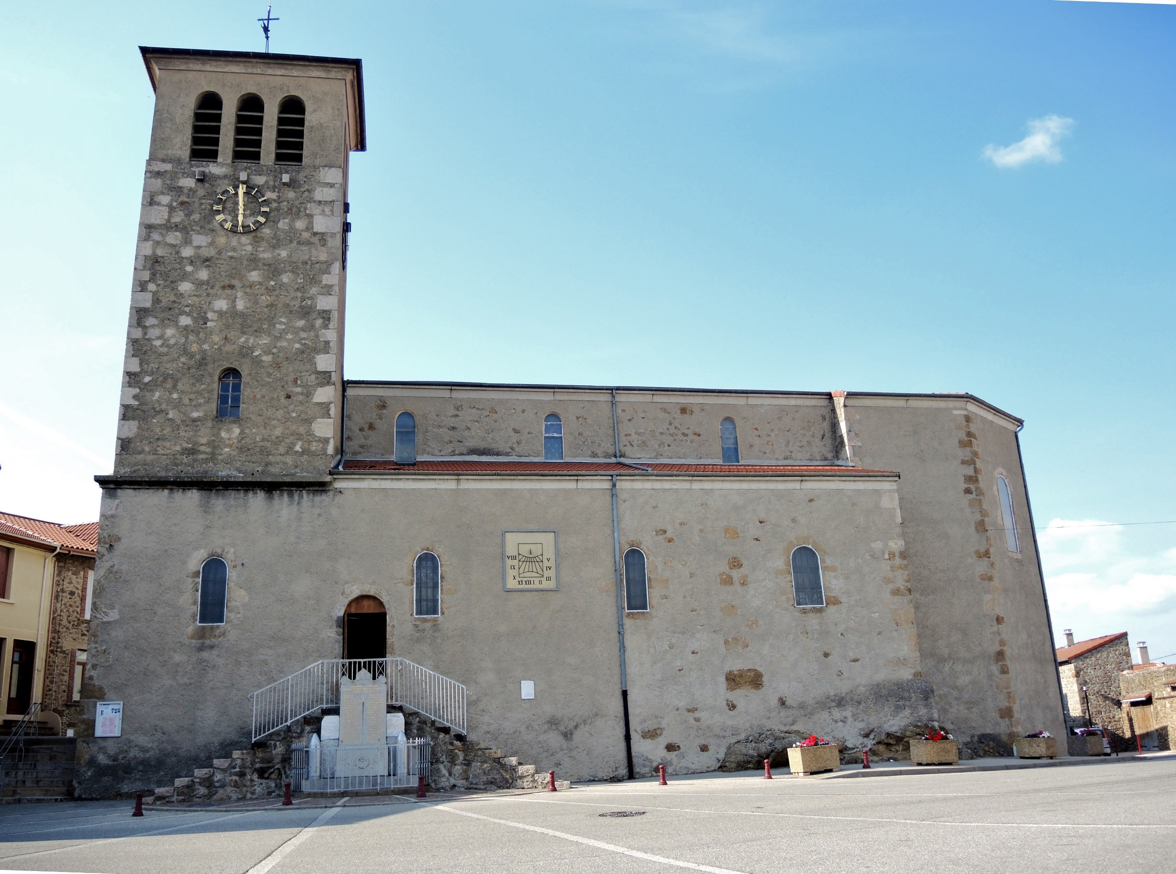 Ardoix église extérieur